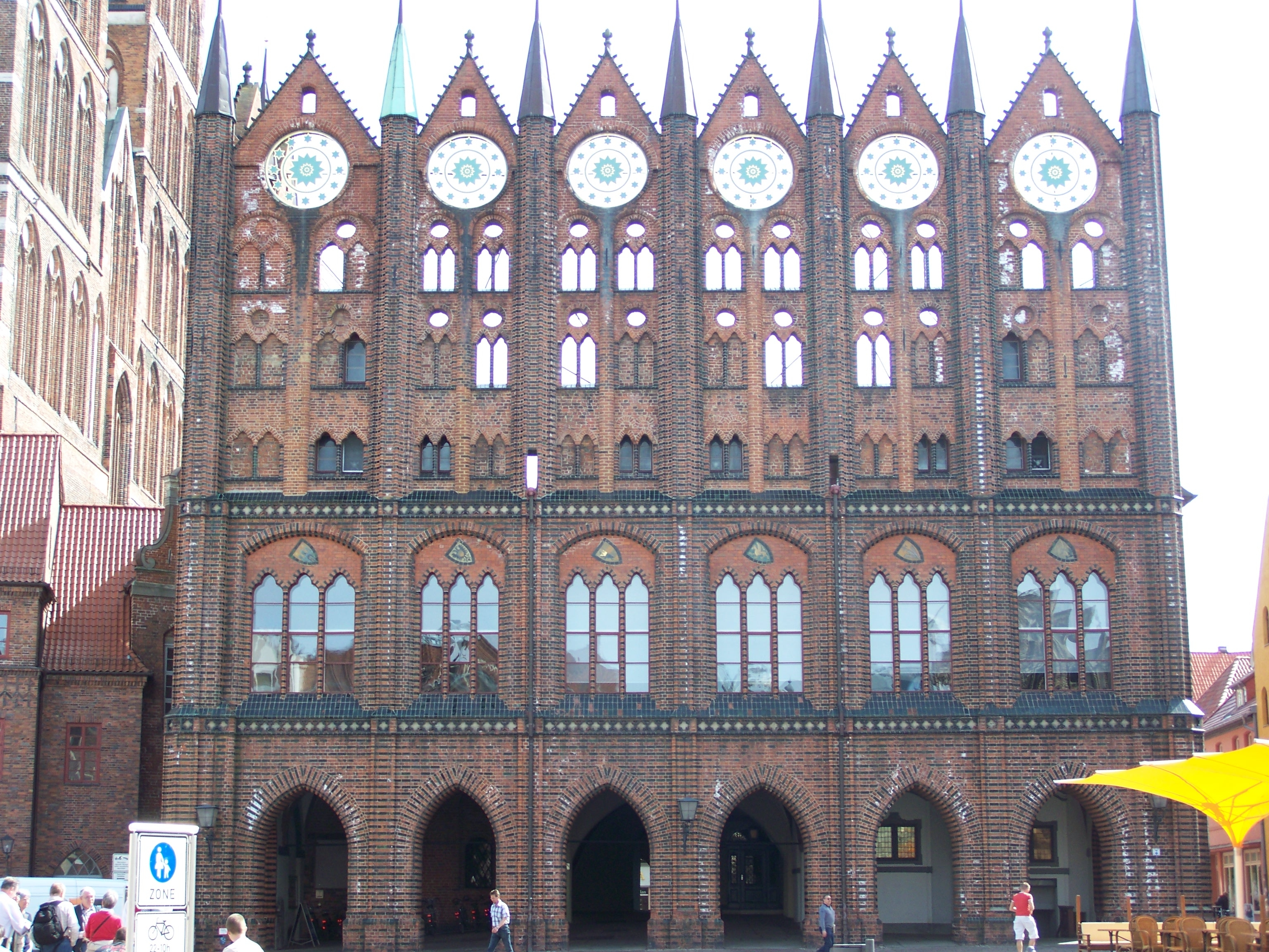 Gebäude am Alten Markt in Stralsund